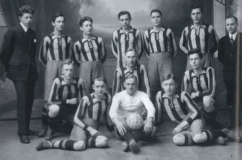 IK City, Eskilstuna när de gick upp i högstaligan Allsvenskan, i det ursprungliga matchstället, mörkblå och ljusblårandig tröja och ljusblå byxor.